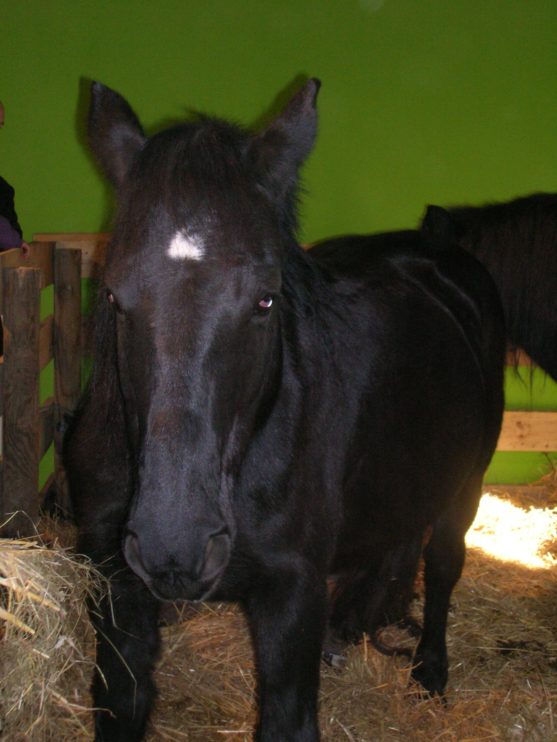 Cheval Mérens au salon SISQA de Toulouse. (salon agroalimentaire et agricole)